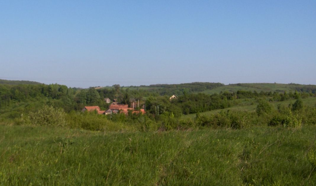 Fotografija sela Klinac kod Petrinje